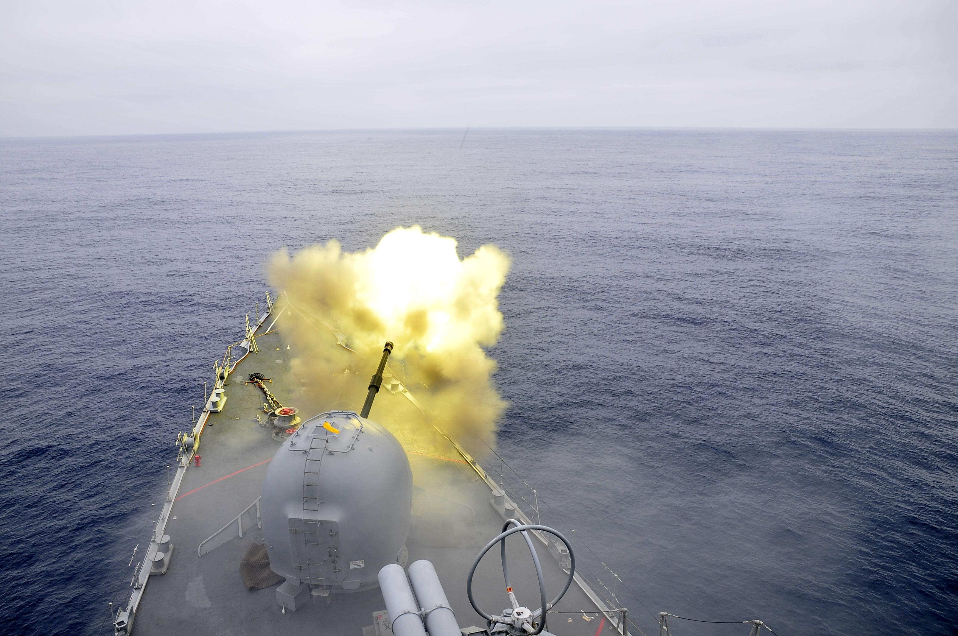 Arquivo liberado pela Marinha do Brasil através de projeto GLAM com Wiki Educação Brasil